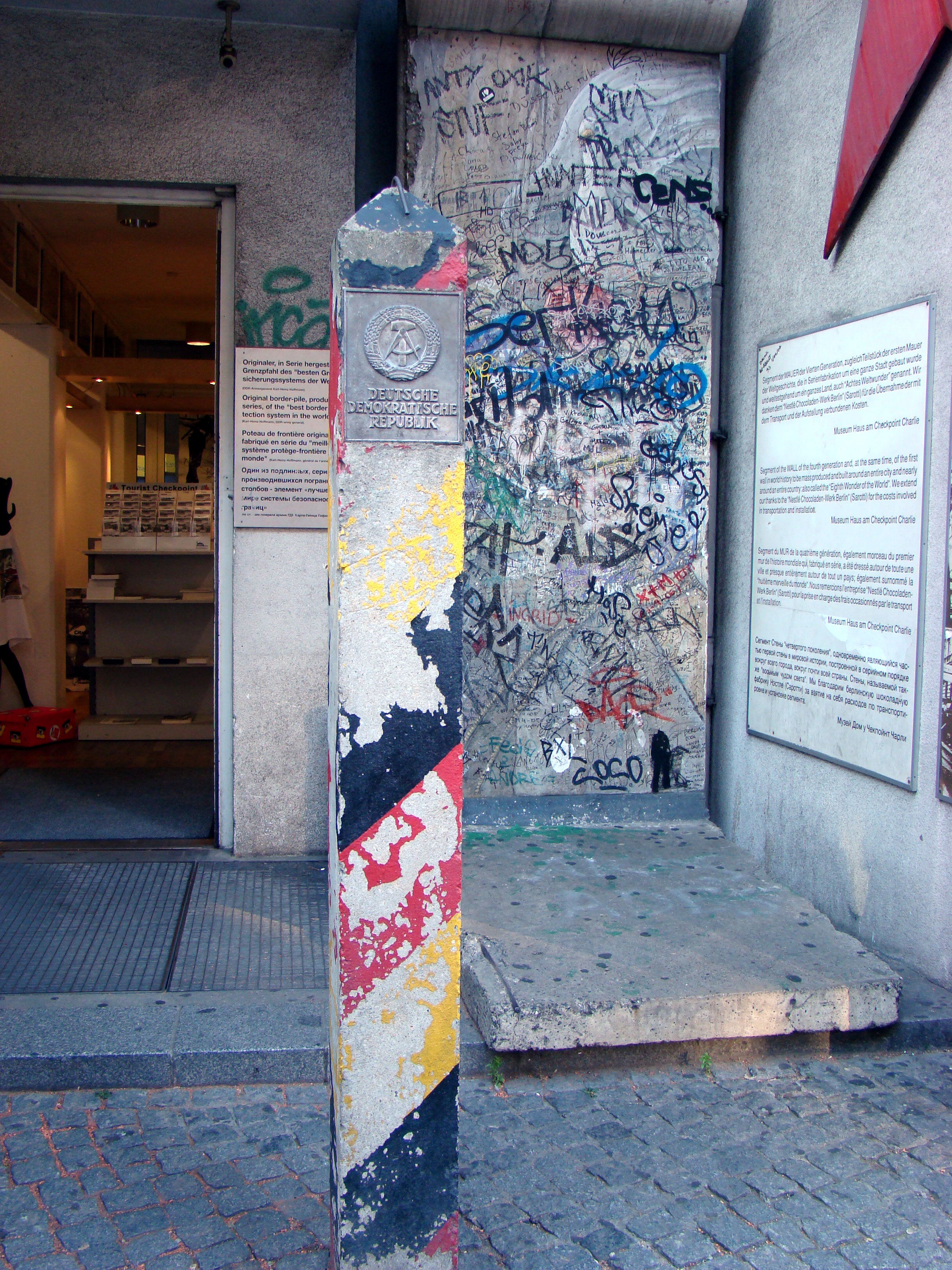 Eingang zum Museum, mit Grenzpfahl der "Innerdeutschen Grenze" und Mauerrest der "Berliner Mauer"